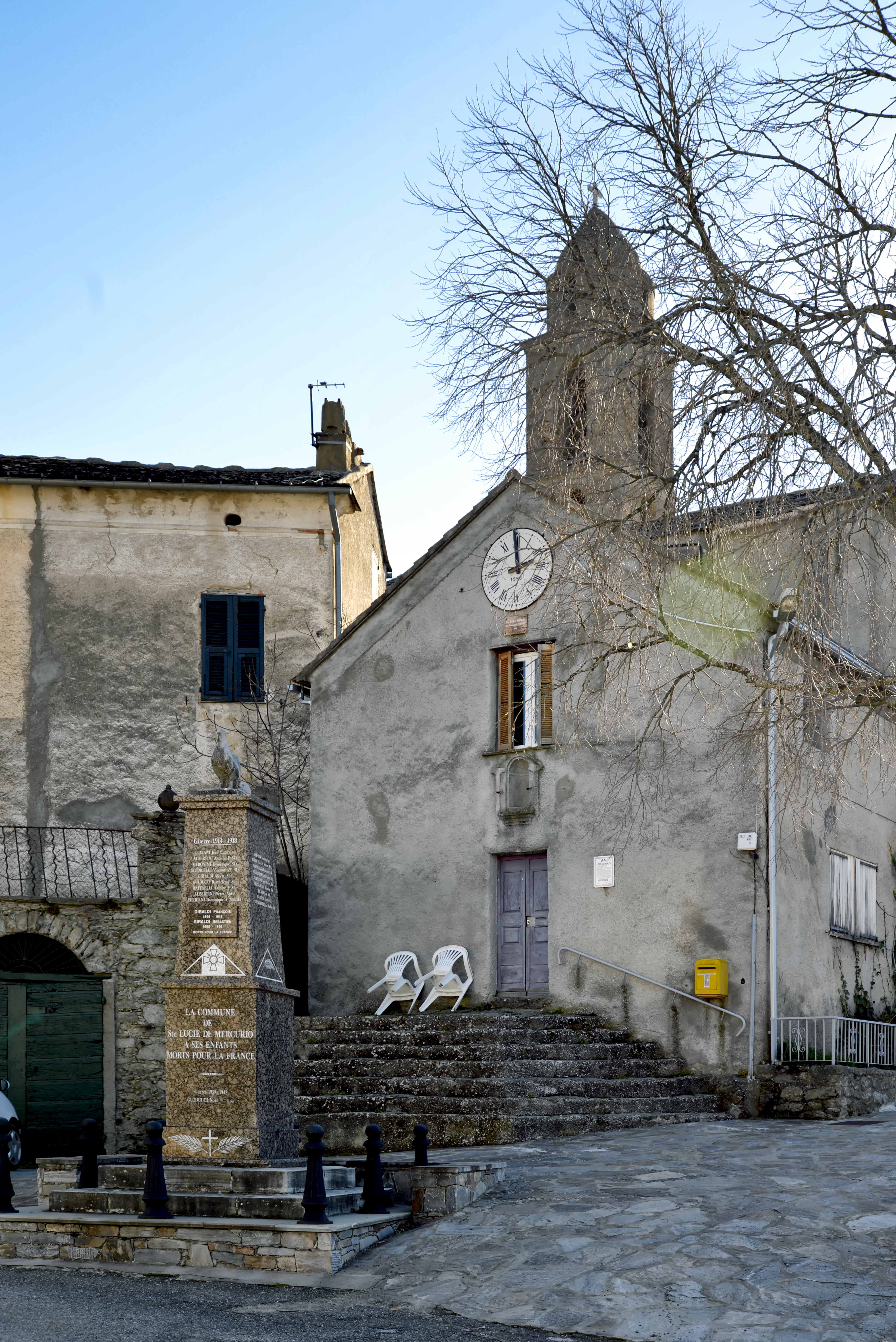 Santa-Lucia-di-Mercurio, Bozio (Haute-Corse) - L'ancienne chapelle de confrérie Sainte-Croix (Santa Croce), actuelle mairie. La salle des fêtes se trouve au niveau inférieur.